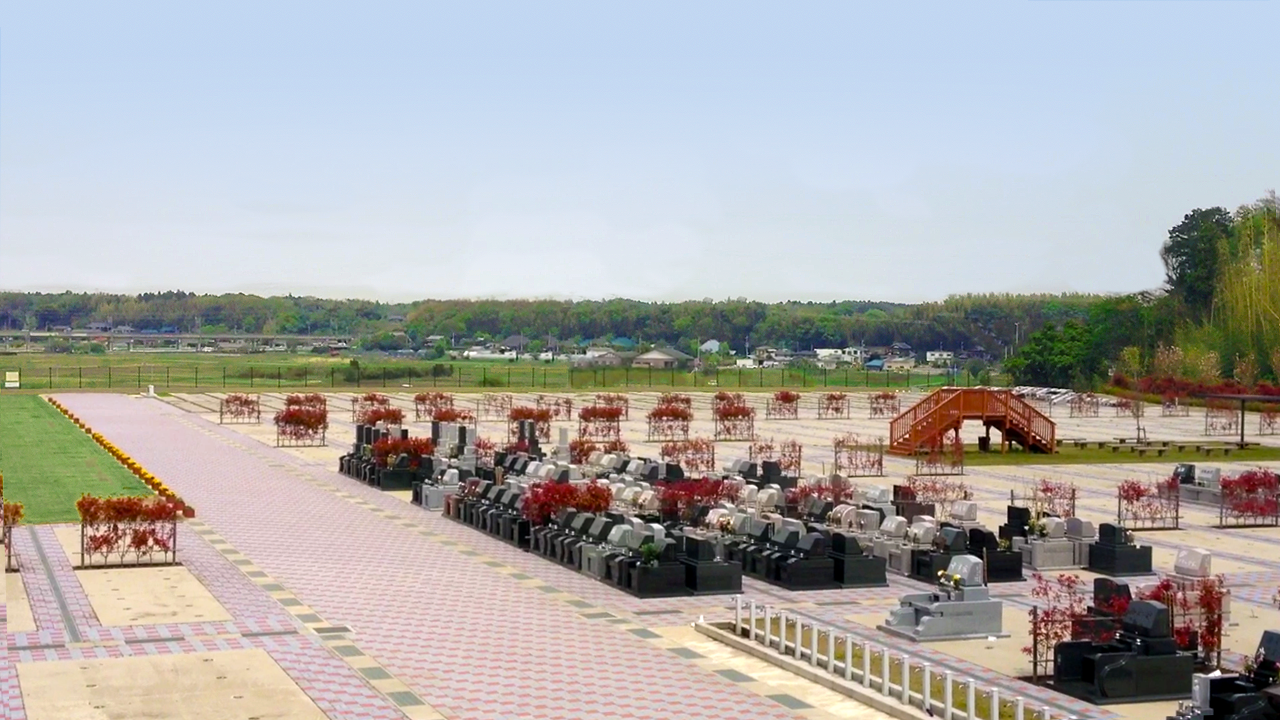 杜の郷霊園の墓地区画